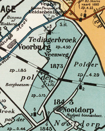 Tedingerbroek_polder